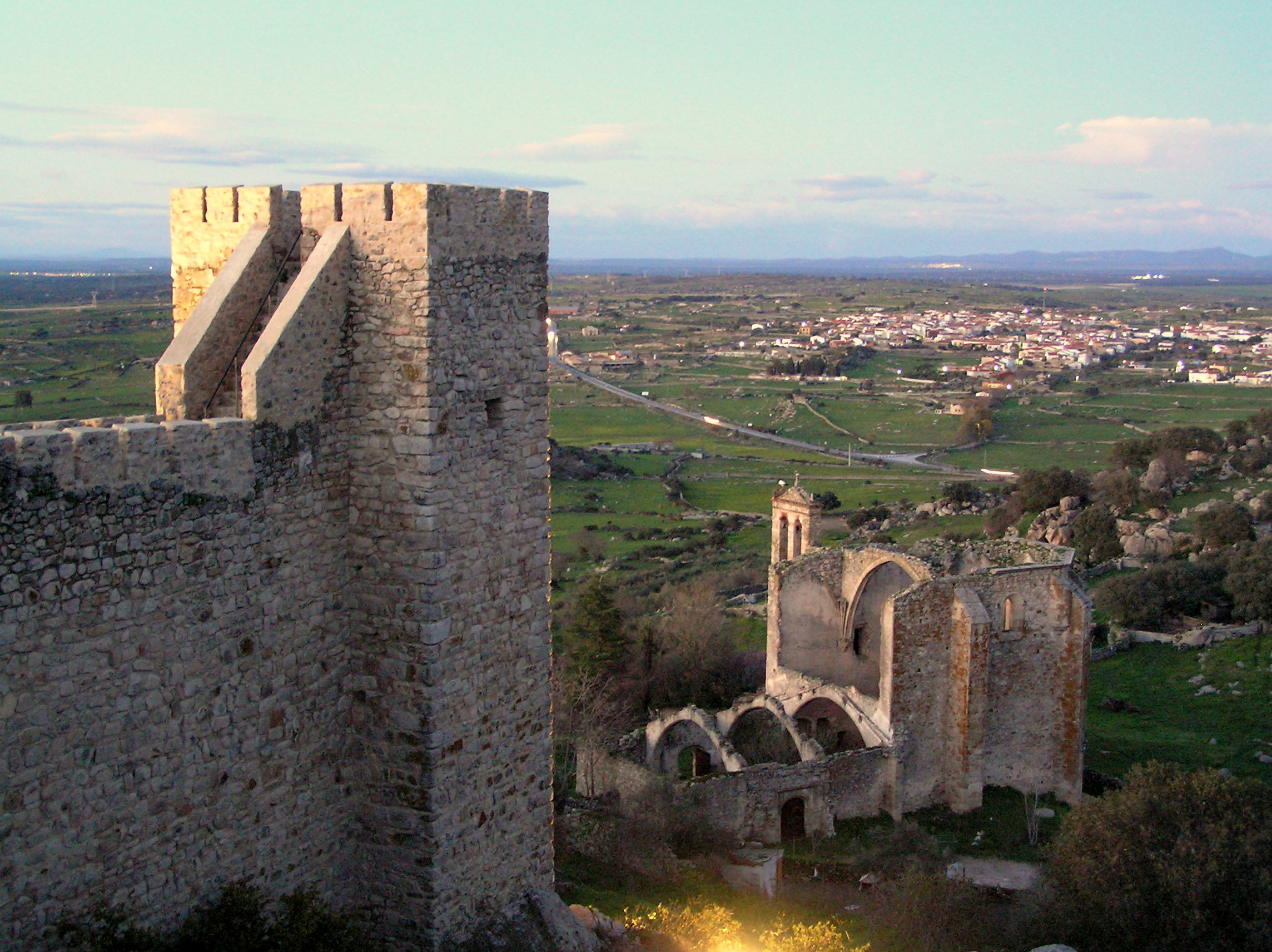 Castillo de Trujillo. Al fondo, las ruinas de la iglesia de Santo Domingo